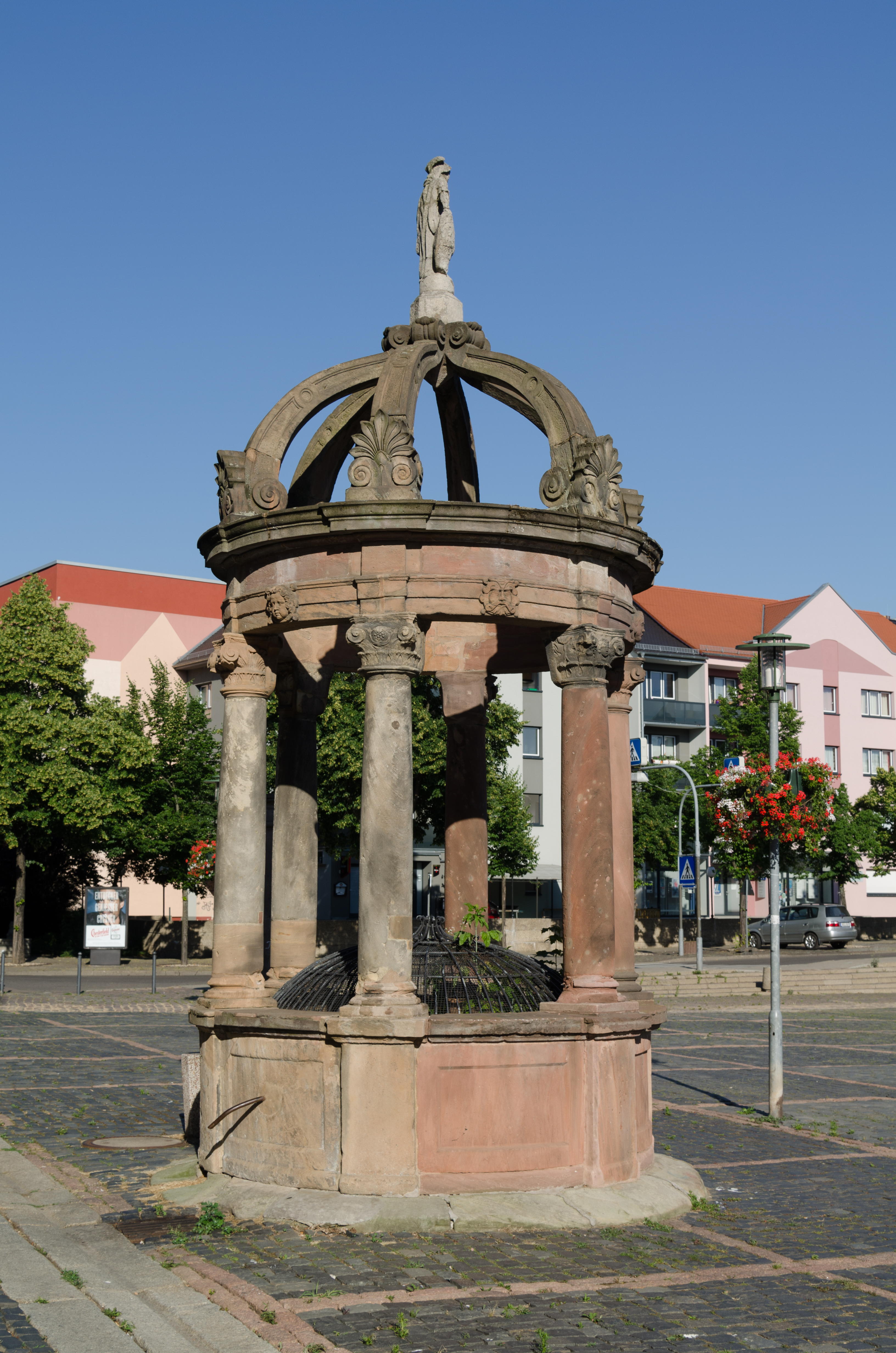 Merseburg, Markt, Staupenbrunnen